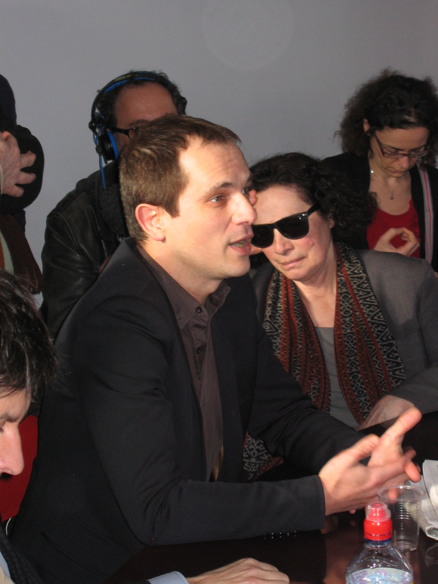 Michaël Foessel le 14 mars 2014 dans les locaux du journal Libération